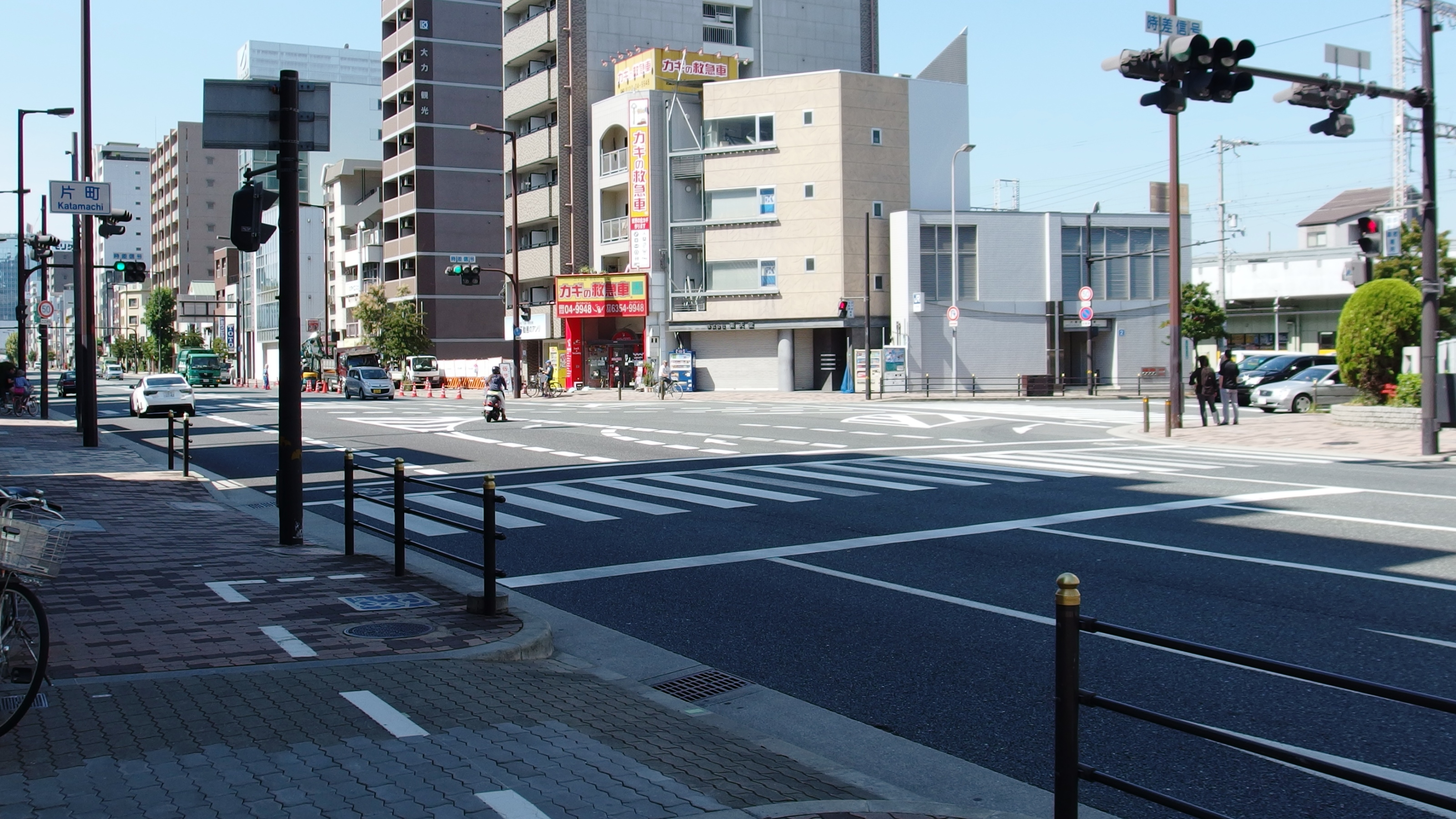 片町交差点, 大阪府大阪市